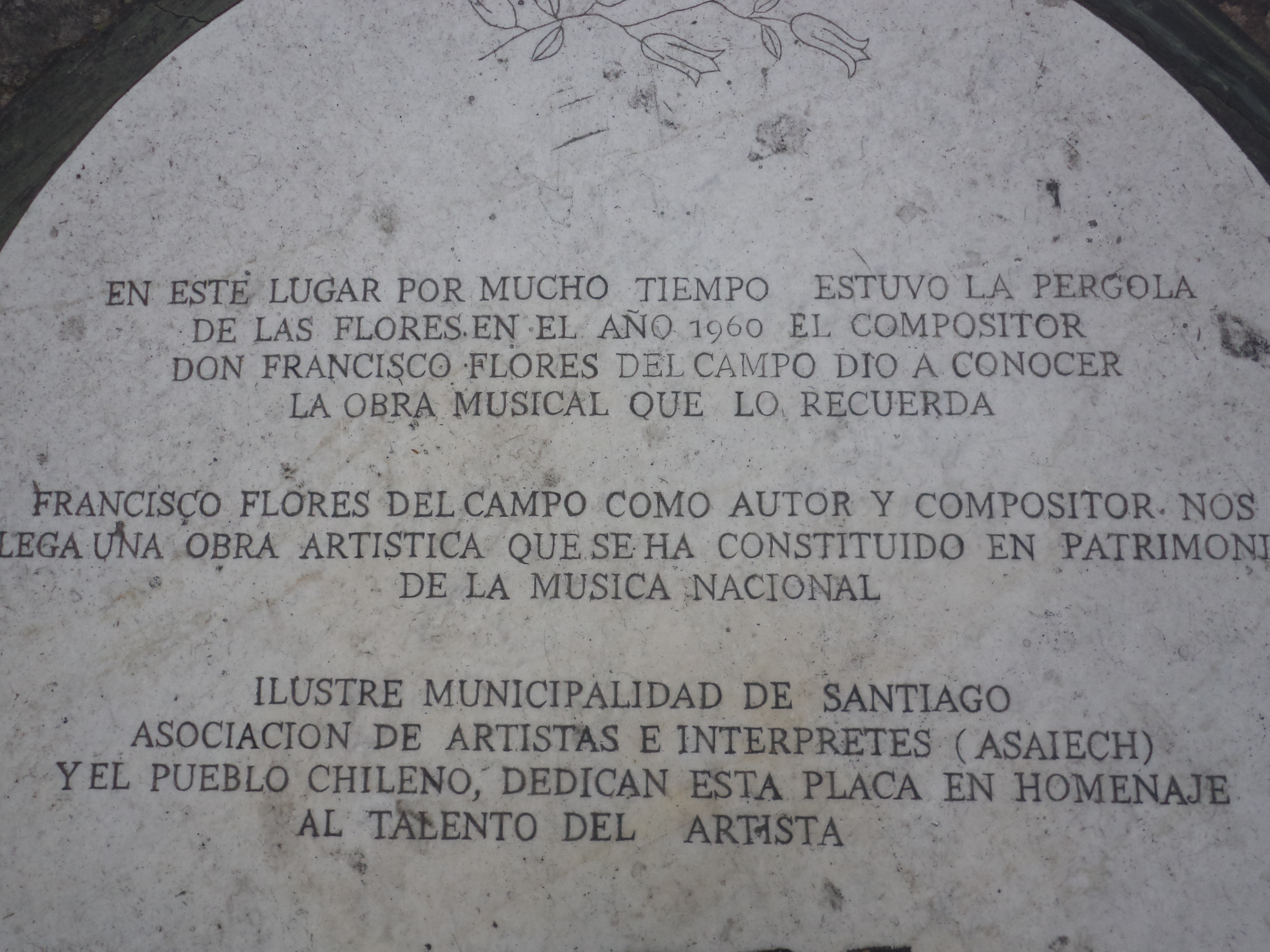 Placa puesta en el sitio histórico donde estaba ubicada Pérgola de las Flores en Alameda frente a Iglesia San Francisco en Santiago de Chile.